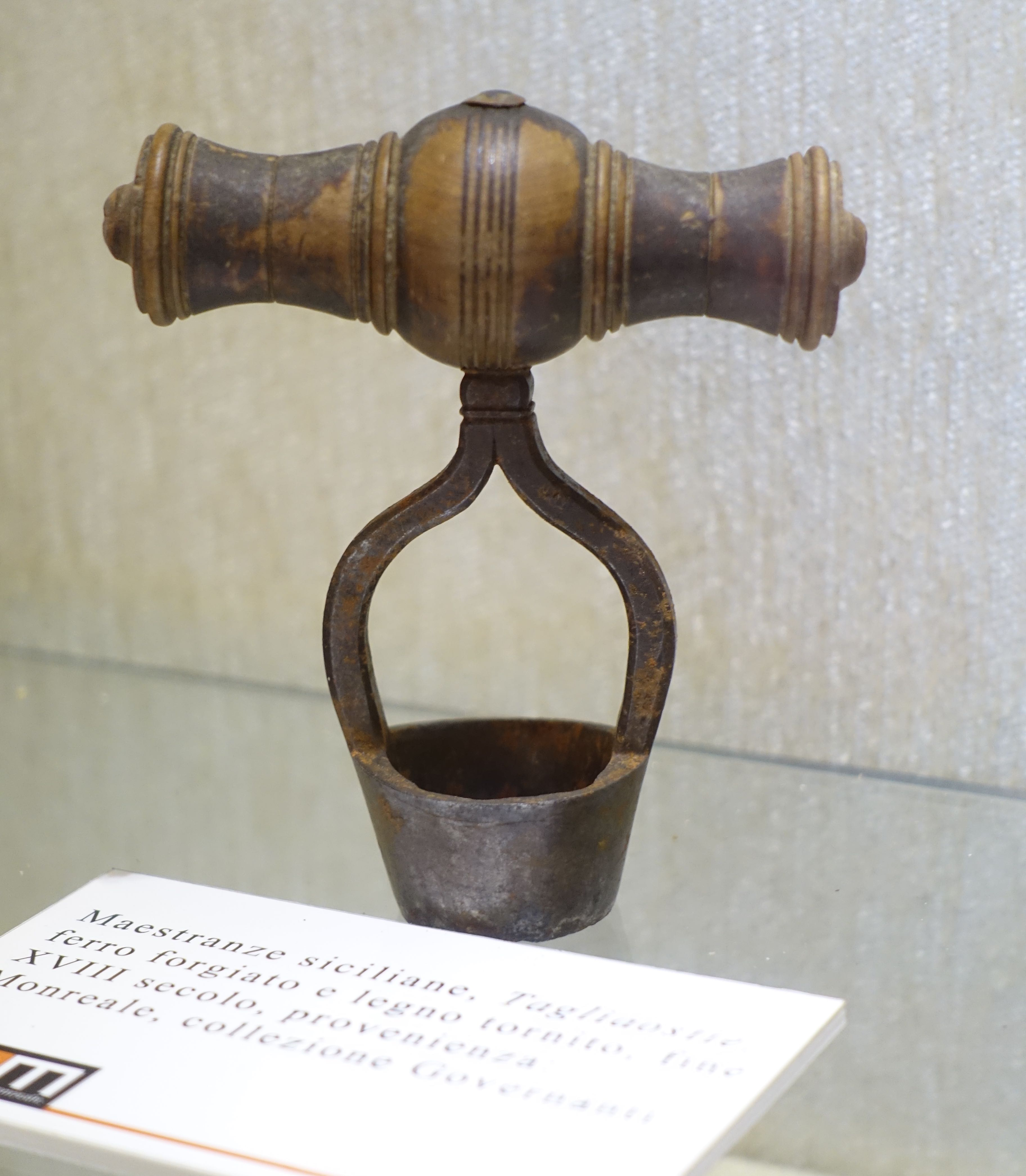 Outil à découper les osties, Musée diocésain de Monreale, Palerme, Sicile